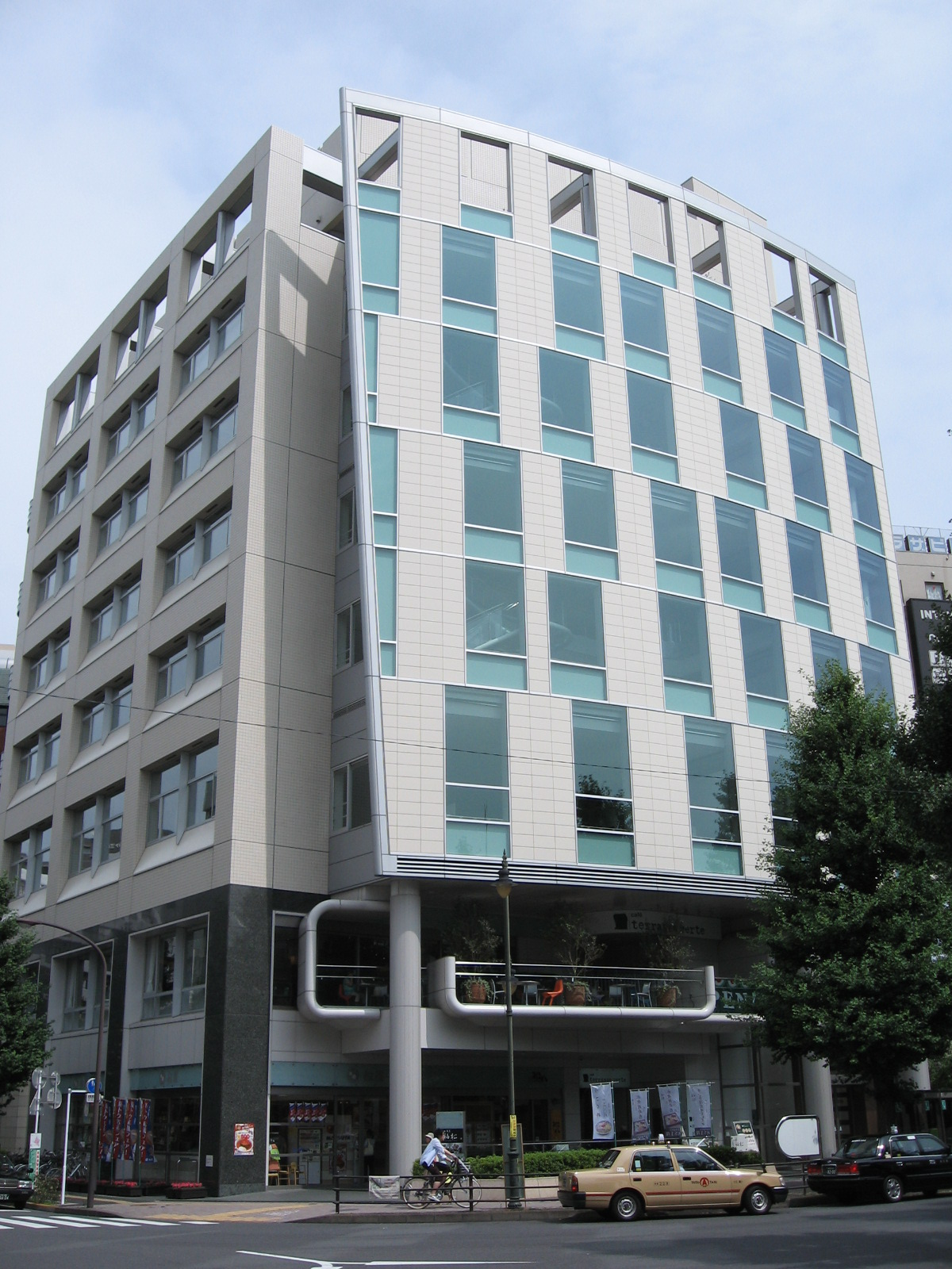 Matsuya Foods Co,.Ltd.